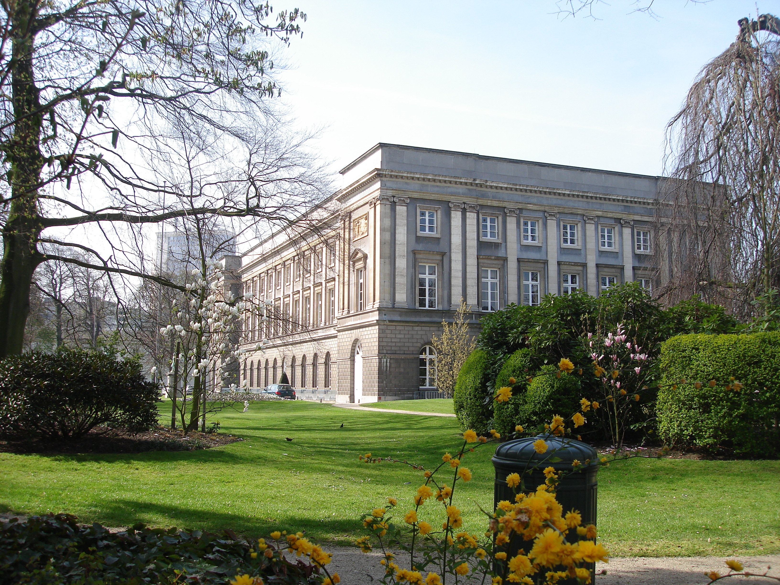 Palais d’Academies, Bruxelles